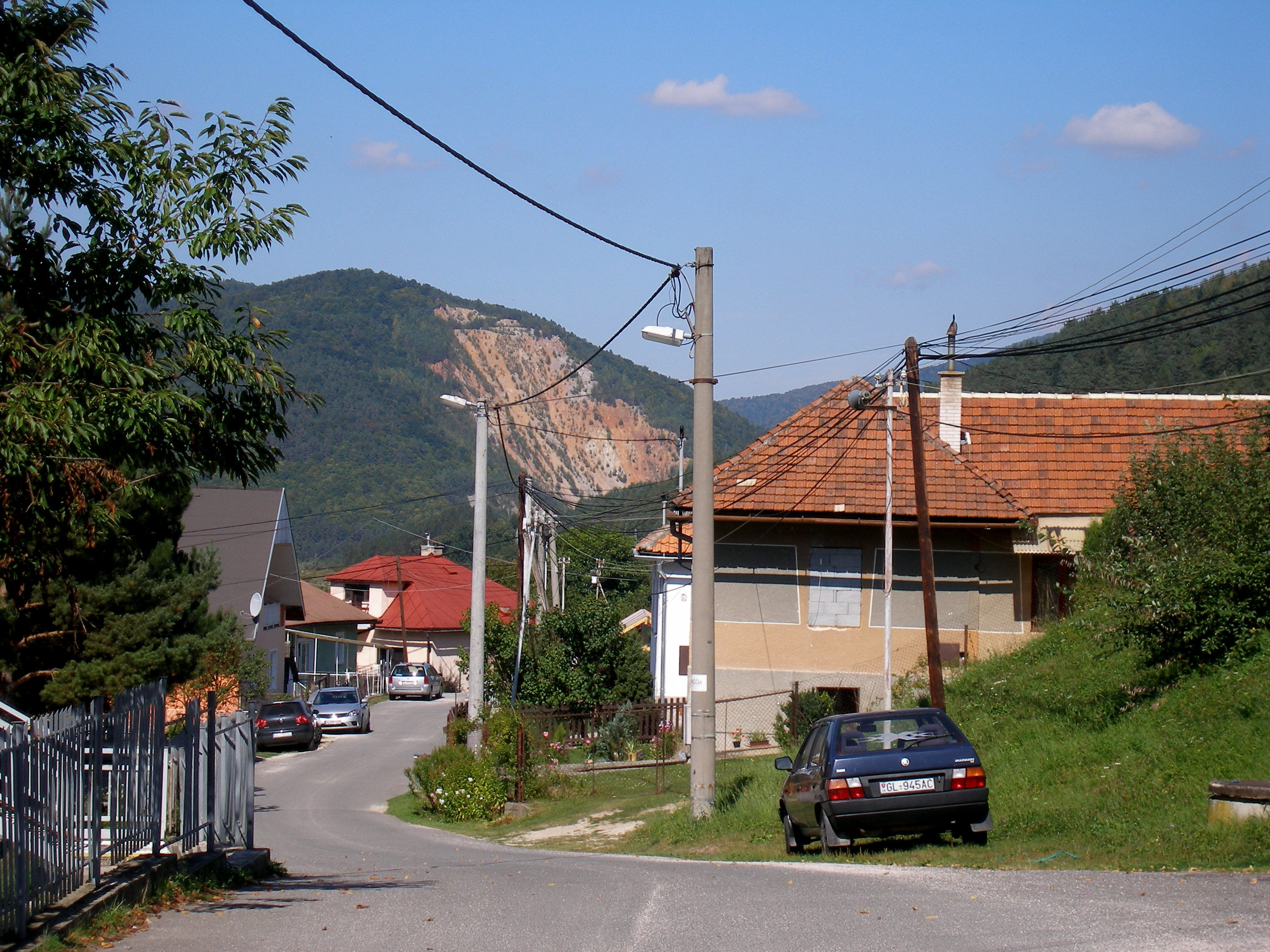 Spišská obec Veľký Folkmar. Okres Gelnica.